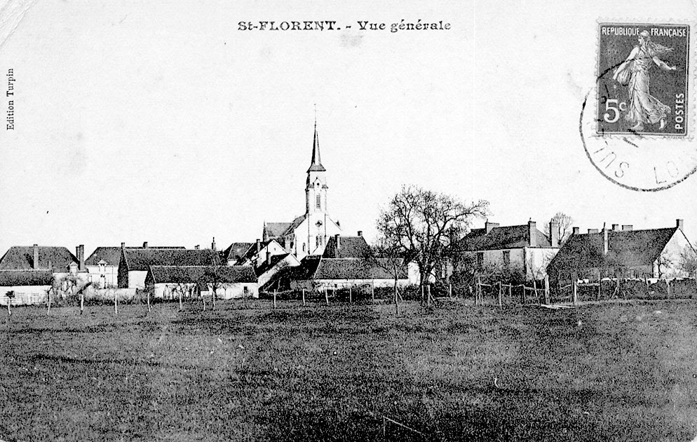 Saint-Florent, Loiret, France